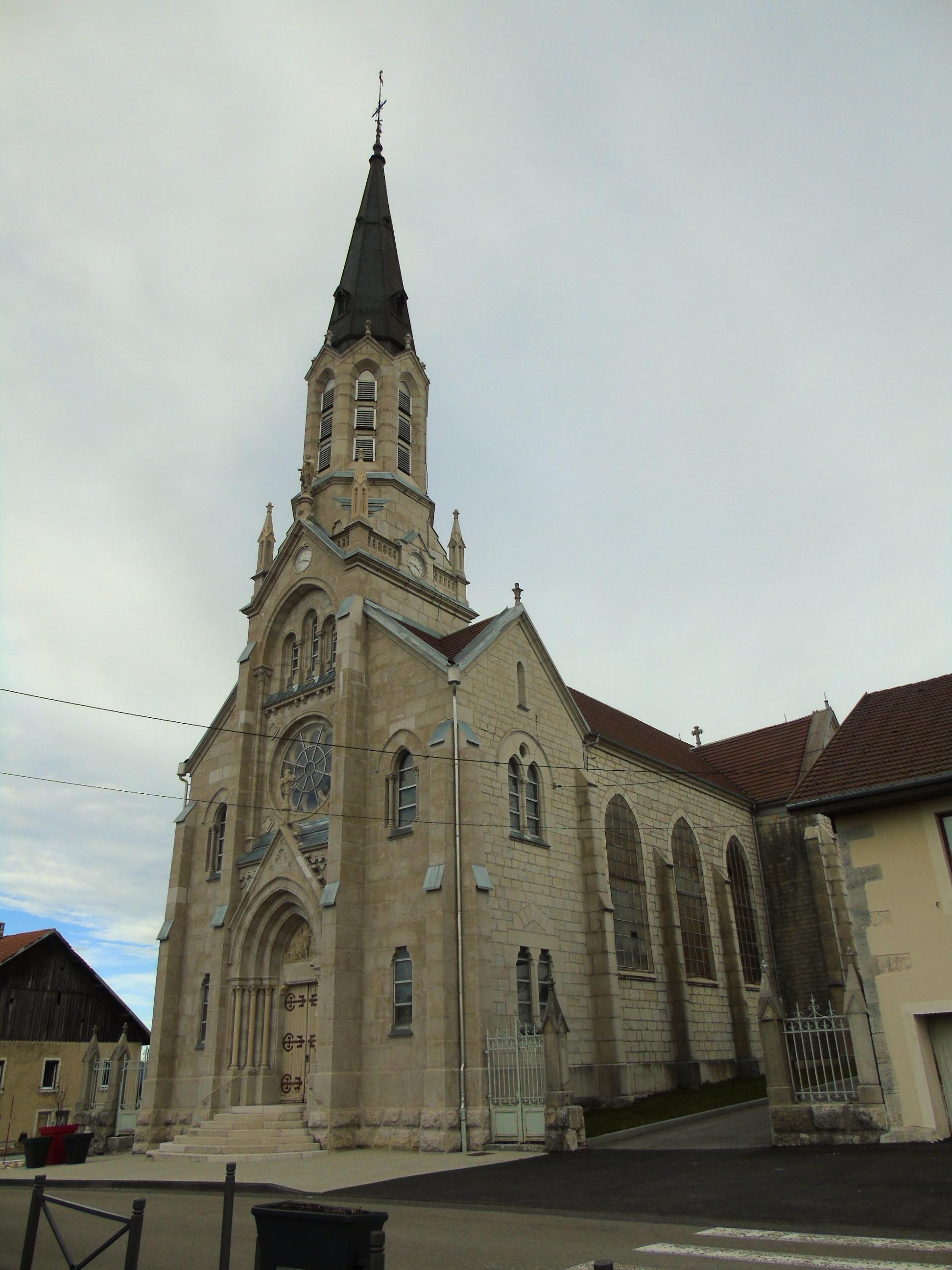 Eglise des Ecorces, Doubs, France